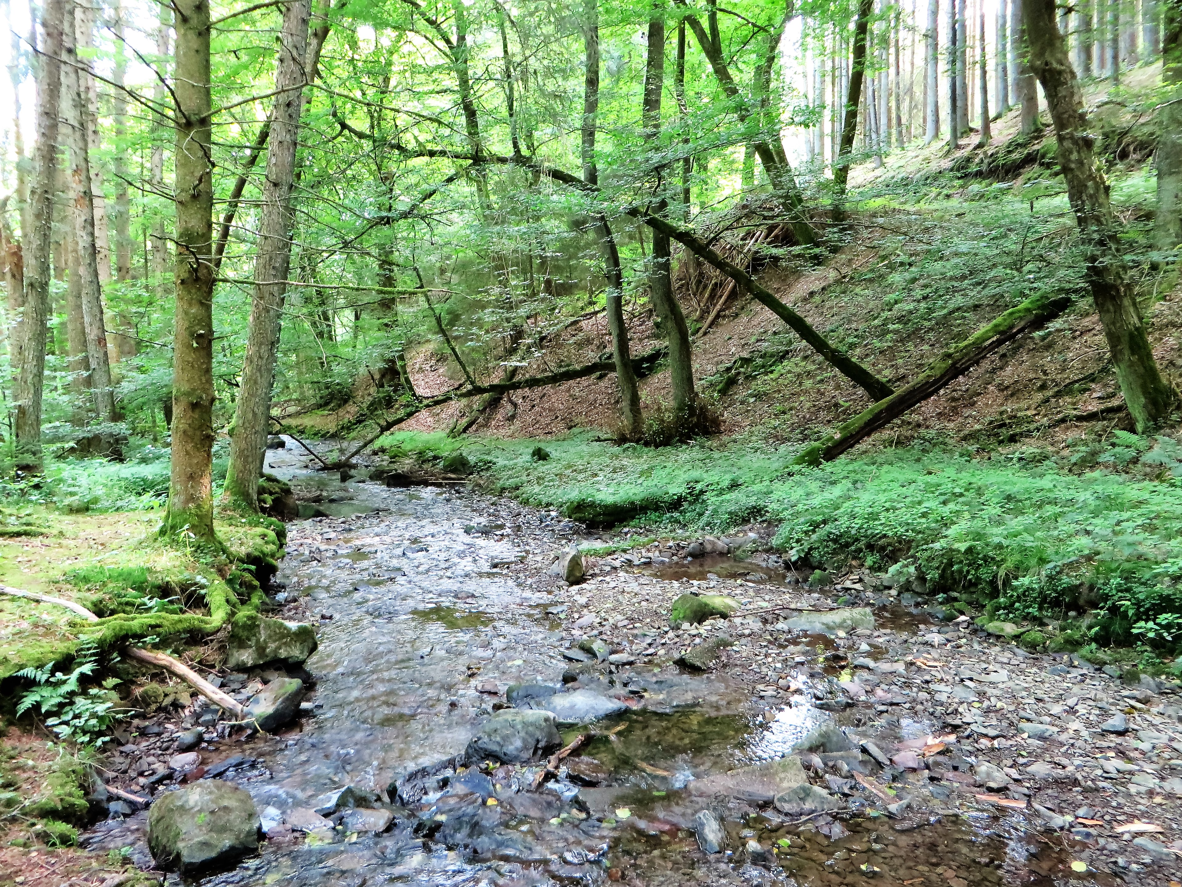 Naturschutzgebiet HA-022 „Bachtal Saure Epscheid“ in Hagen-Priorei, Osemundstraße Richtung Breckerfeld. Es handelt sich um ein tief eingeschnittenes Kerbtal südlich von Reckhammer. Die Hänge sowie Flächen entlang des Baches sind bewaldet, z.T. Erlen-Eschenwald, z.T. mit Fichten und Lärchen aufgeforstet. Auf dem Foto fließt der Epscheider Bach Richtung Reckhammer, weiter nach Priorei, und mündet dort in die Volme.